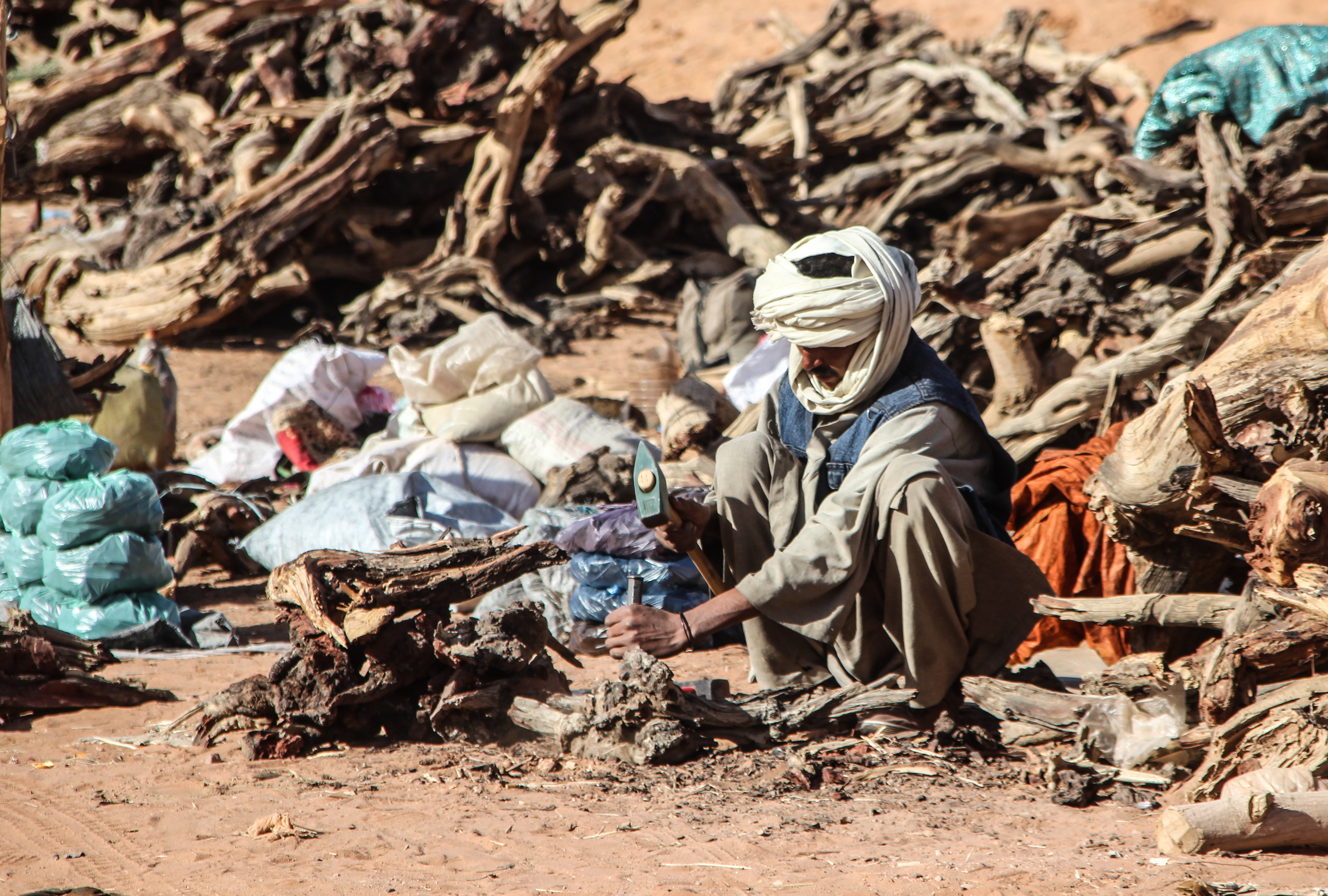 Hassi ermel, Algerie le bois est tellement rare que les habitants vendent du bois pour les voyageurs. This is an image of "African people at work" from Algeria